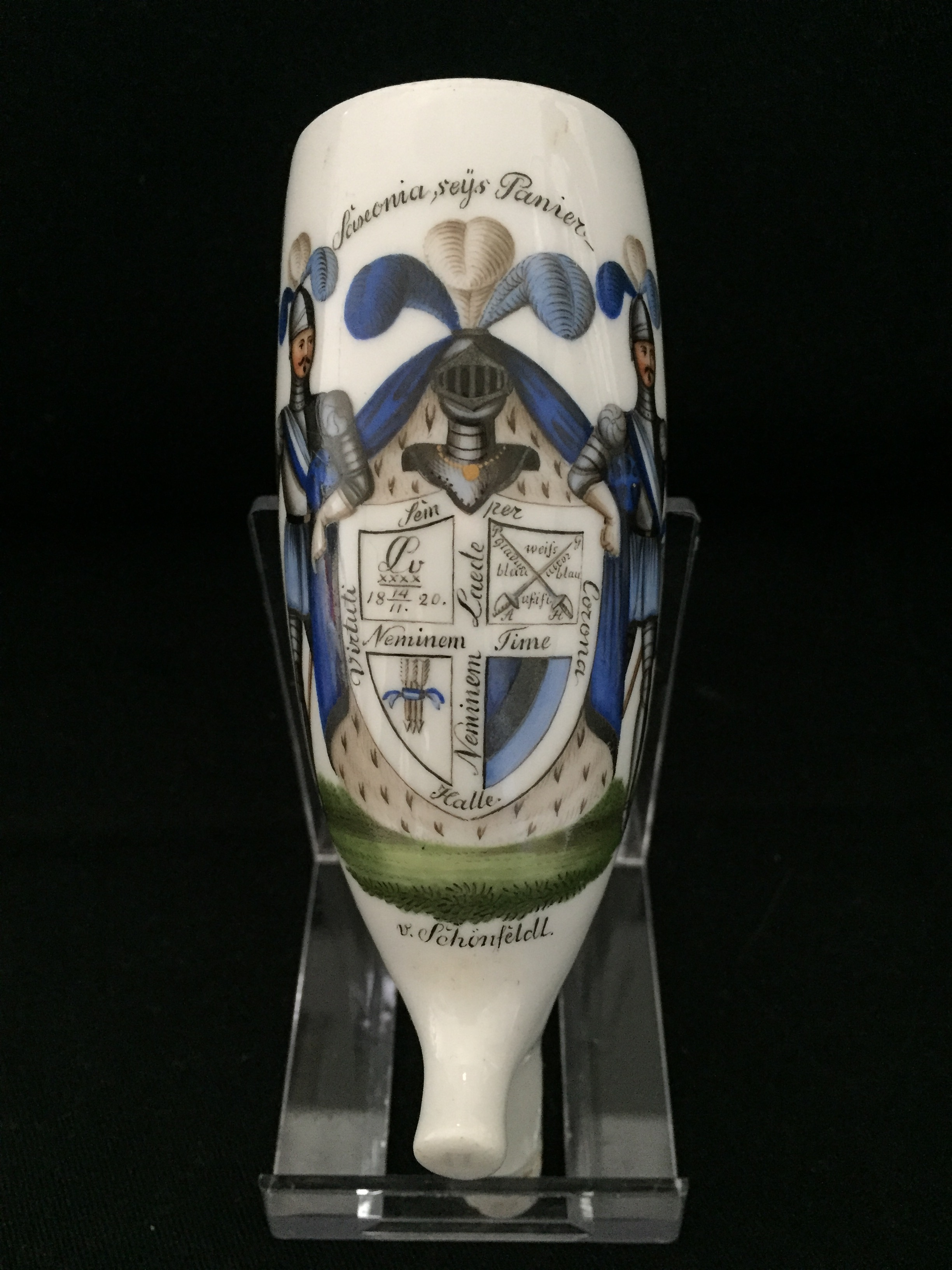 Pfeifenkopf des Corps Saxonia Halle aus dem Jahr 1826. Vorderseitig das Vollwappen des Corps, rückseitig 68 Namen Hallenser Sachsen aus den Jahren 1820-1826.